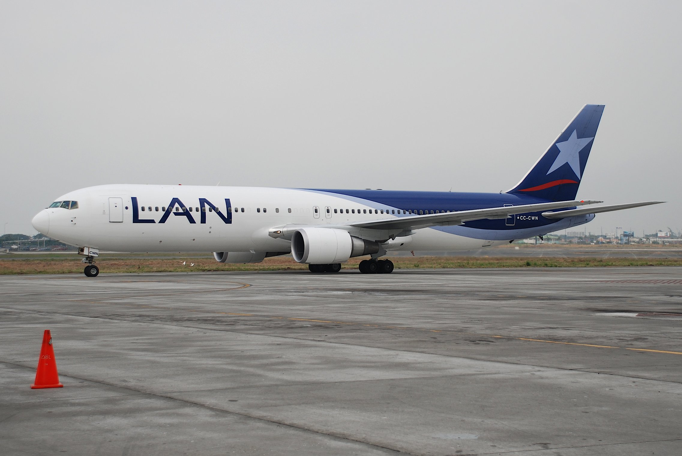 LAN Boeing 767-300; CC-CWN@UIO;24.06.2008/516am